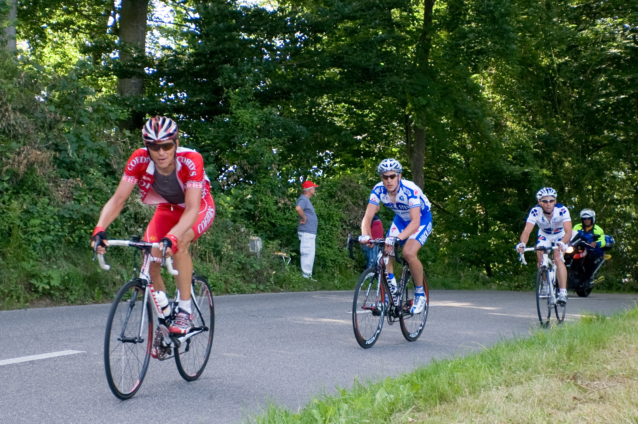 Frank Høj (Cofidis), Huber Schwab (Quickstep), Tour de Suisse 2008.